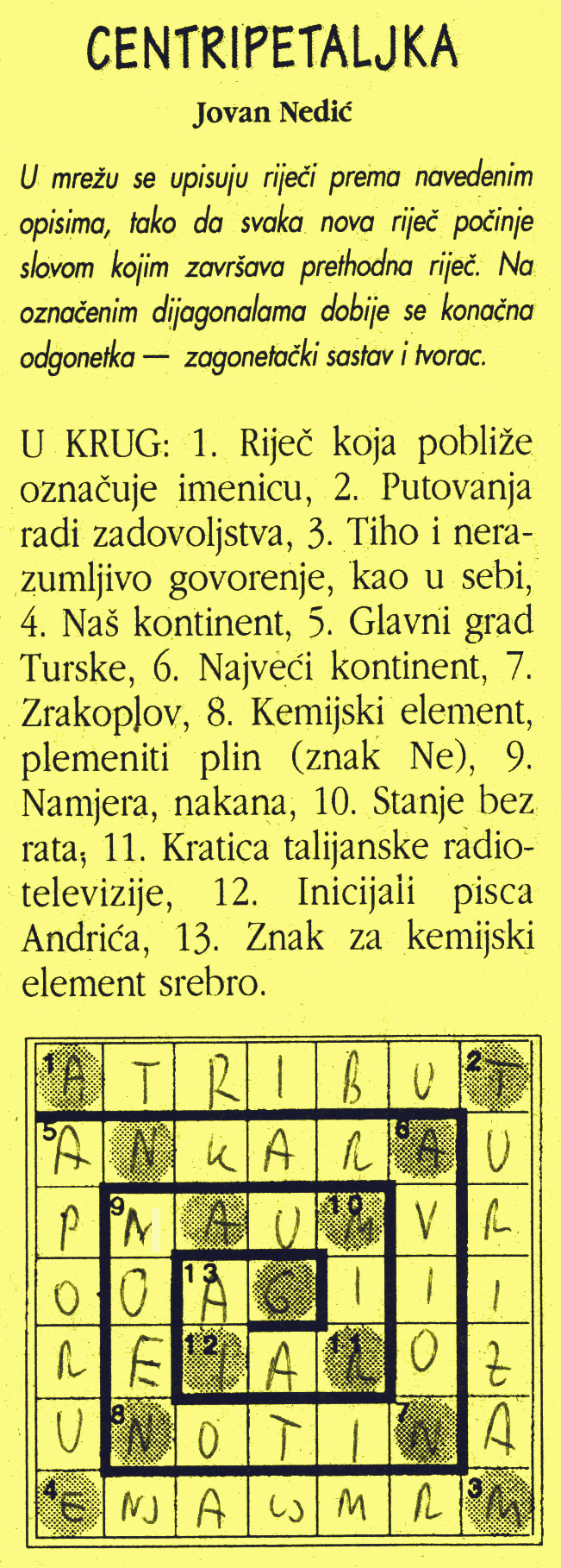 centripetaljka